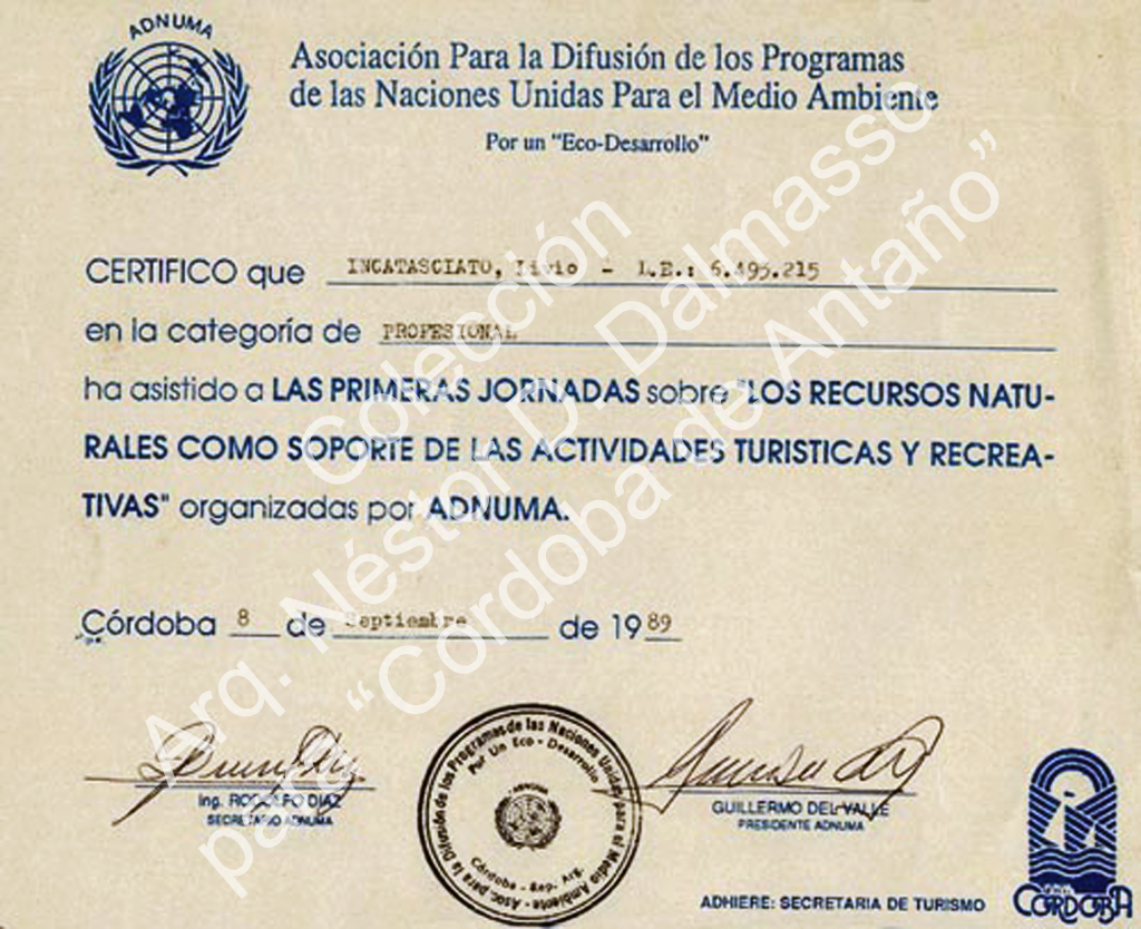 Livio Incatasciato 17 Adnuma-1989-P